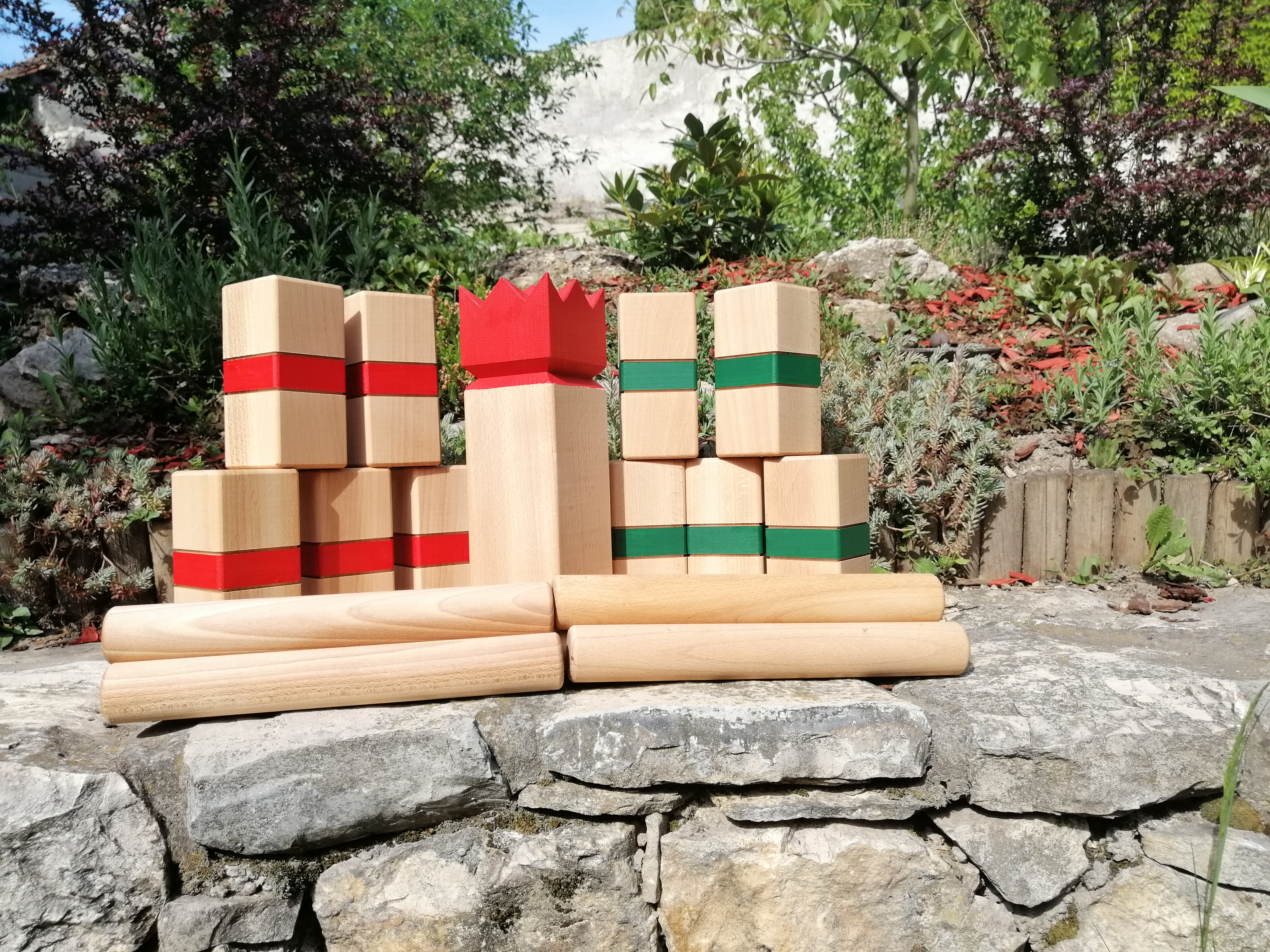 Kubb készlet Veszprém